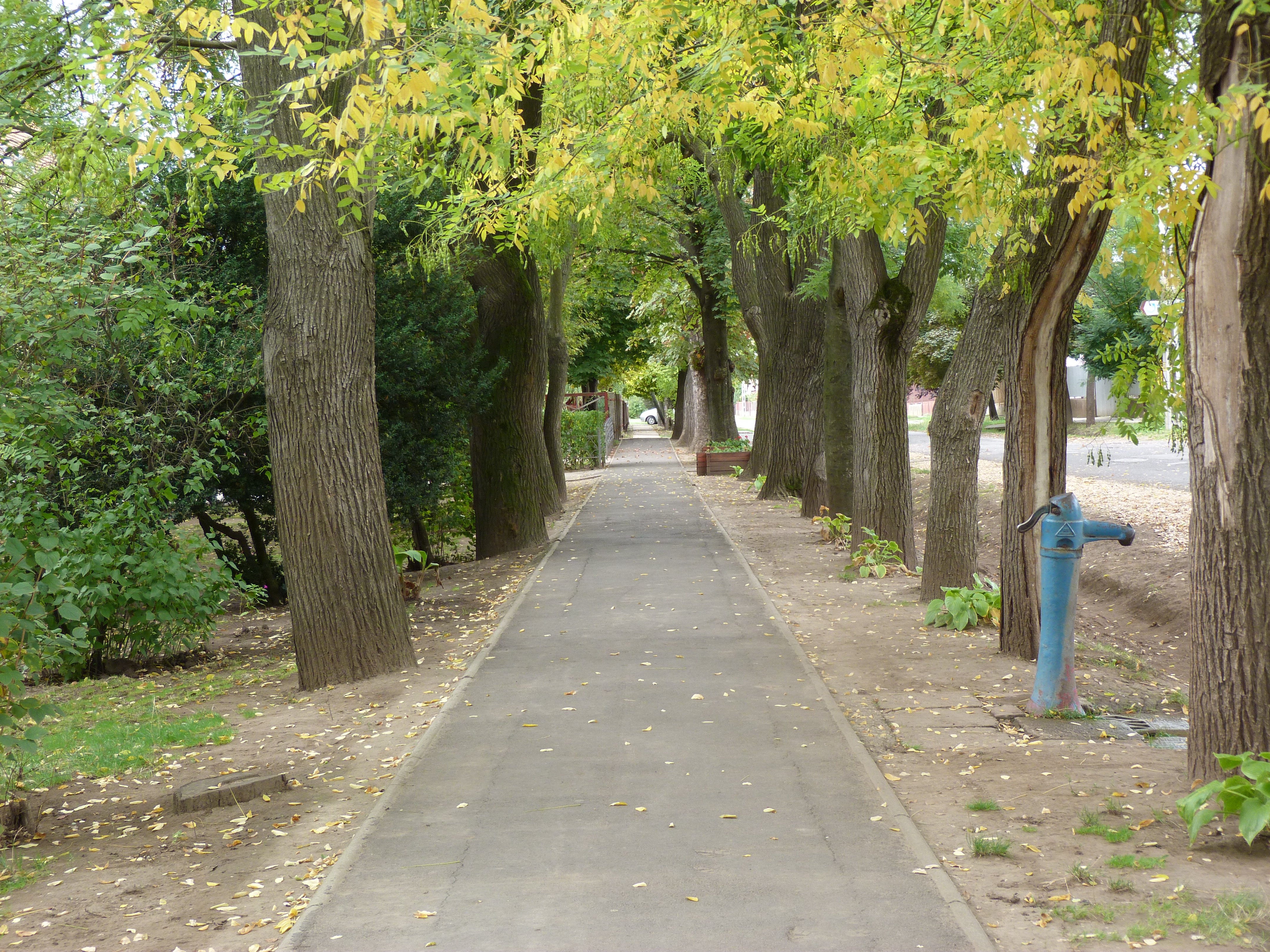 A felvételek 2013. szeptember 24 -én készültek Hajdúviden. ©© Derzsi Elekes Andor, Budapest, 2013, You are authorised to use these photos and vids under Creative Commons – even for commercial, for profit purposes. Photos must be attributed to Derzsi Elekes Andor. All of the photos and vids in the Metapolisz DVD line are under Creative Commons and can be used even for commercial – for profit – purposes. Recommended Citation Derzsi Elekes Andor: Metapolisz DVD line